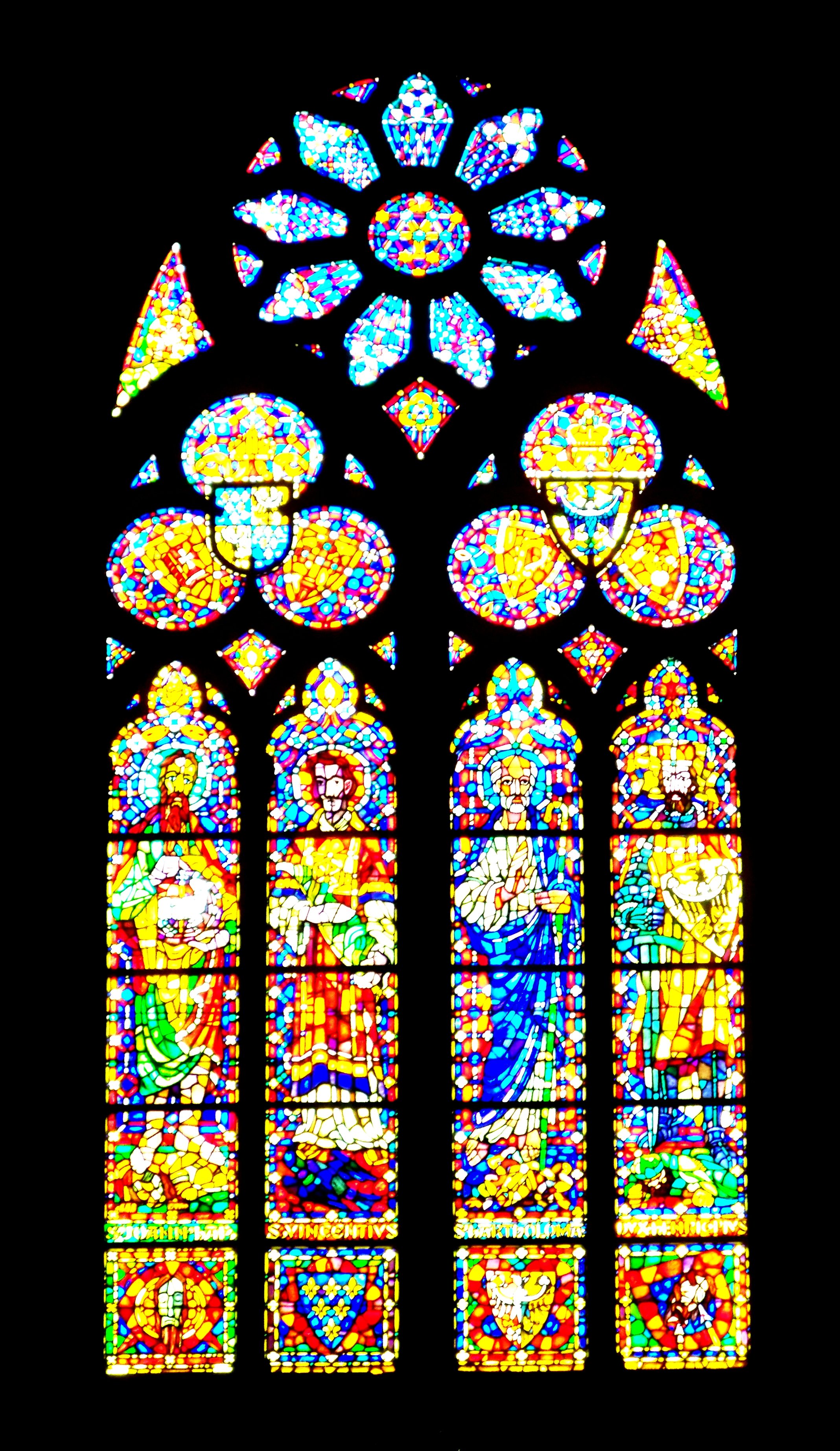 Archikatedra wrocławska.